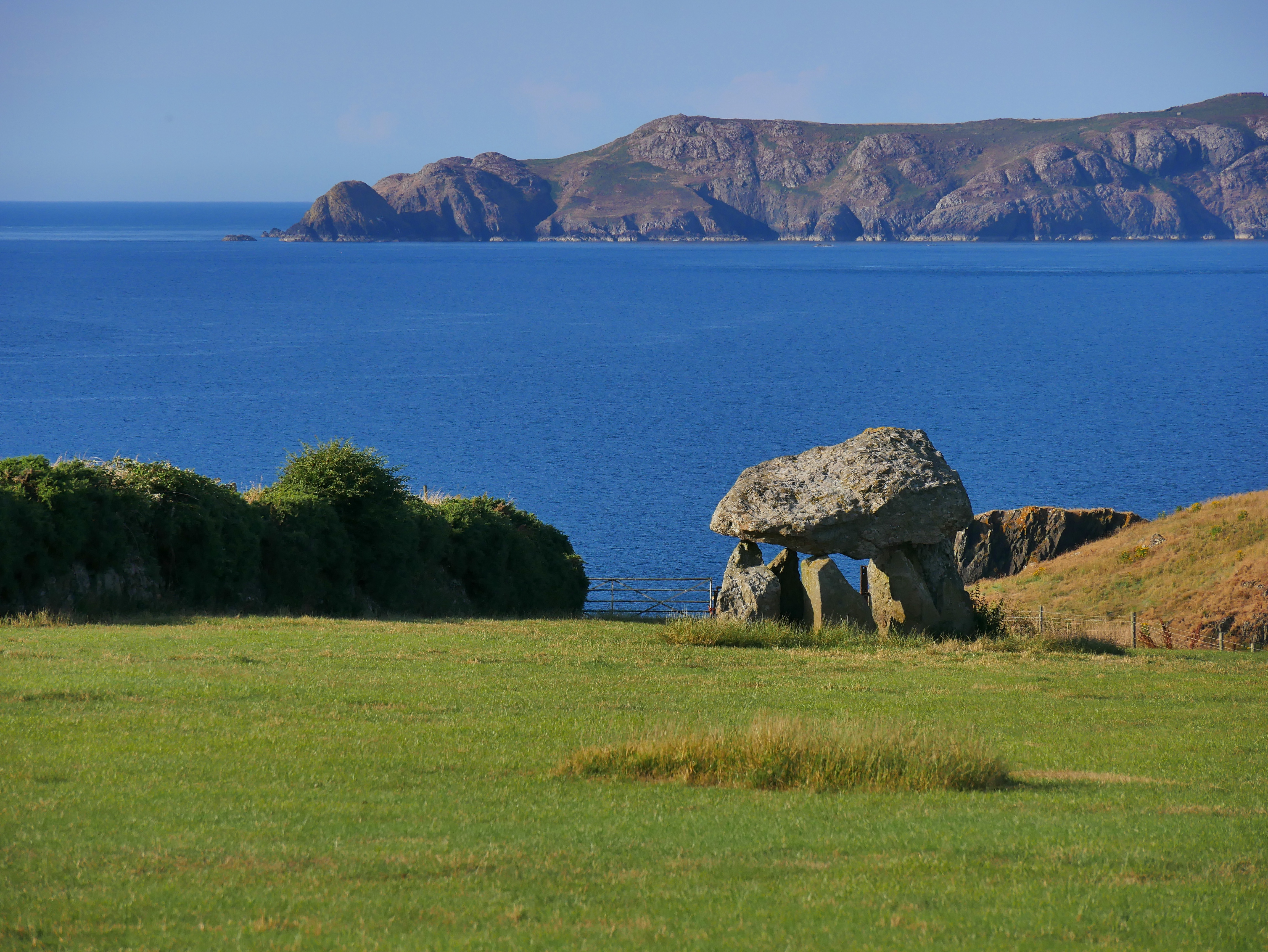 Carreg Samson - a neolitic dolmen in southwest Wales.